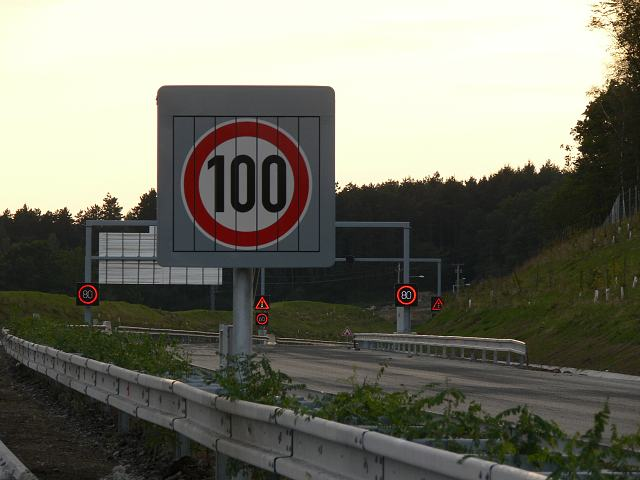 Tunnel Valík, Highway D5, Czech Republic; proměnné dopravní značení